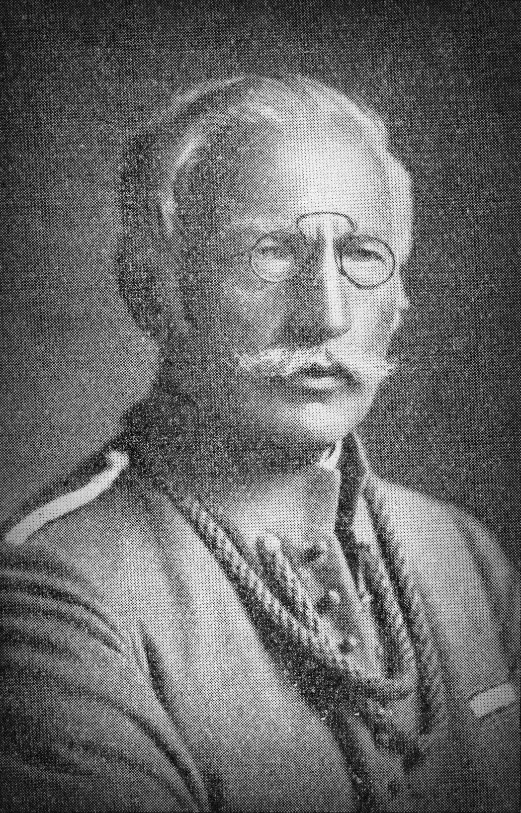 František Krásný (1865-1947), český architekt